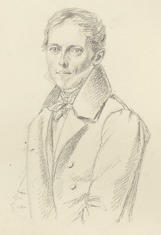 Röök, Lars Jakob von (1778-1867)